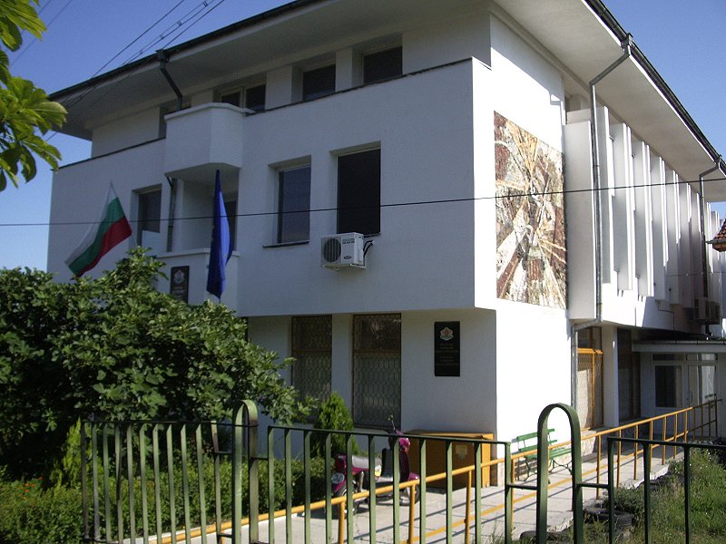 Автор на снимката е Ивайло Писков.